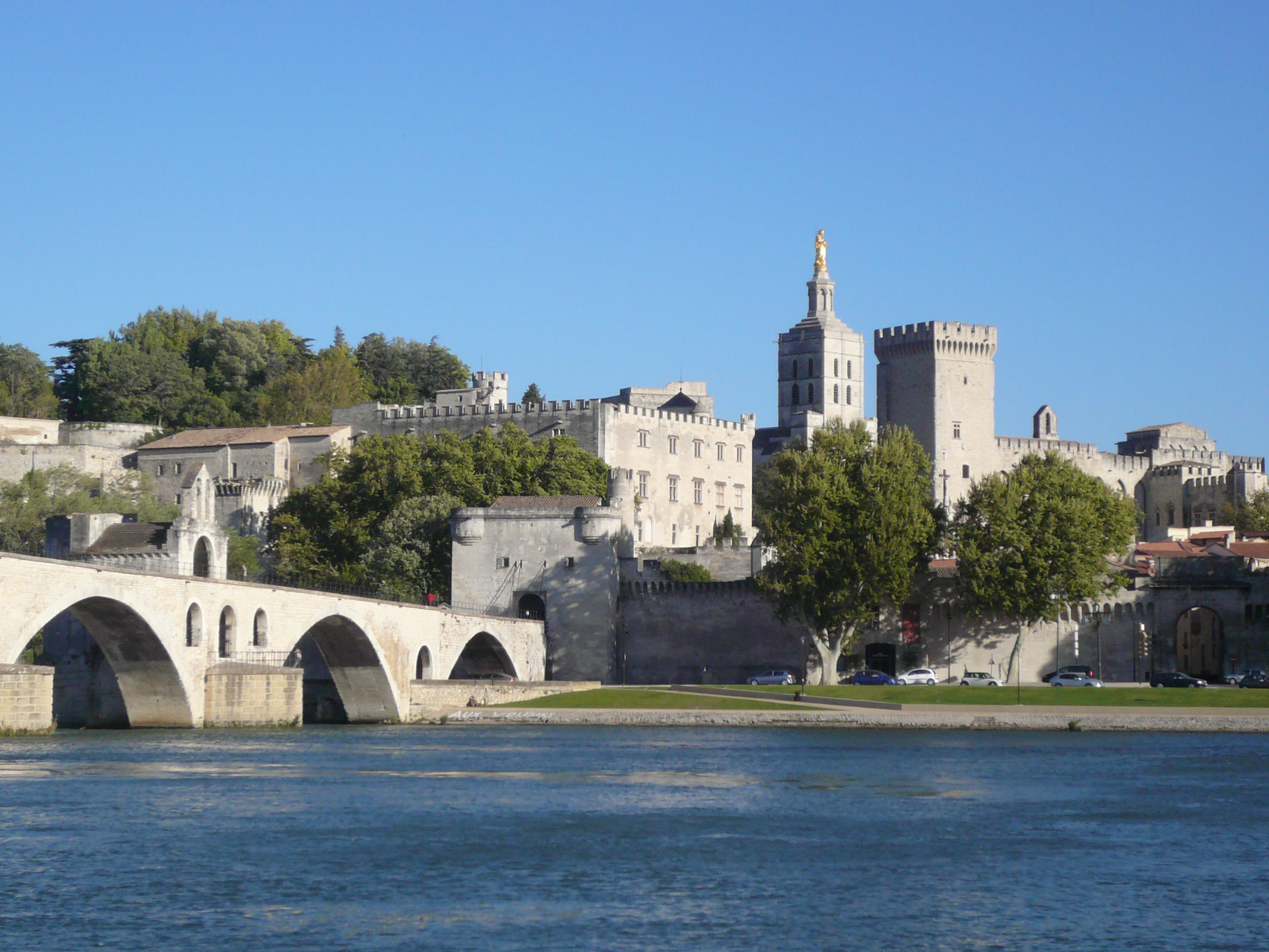 Papstpalast und Brücke